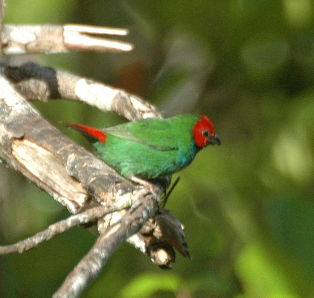 Fiji Parrotfinch (Erythrura pealii) Colo-I-Suva NP, Viti Levu, Fiji